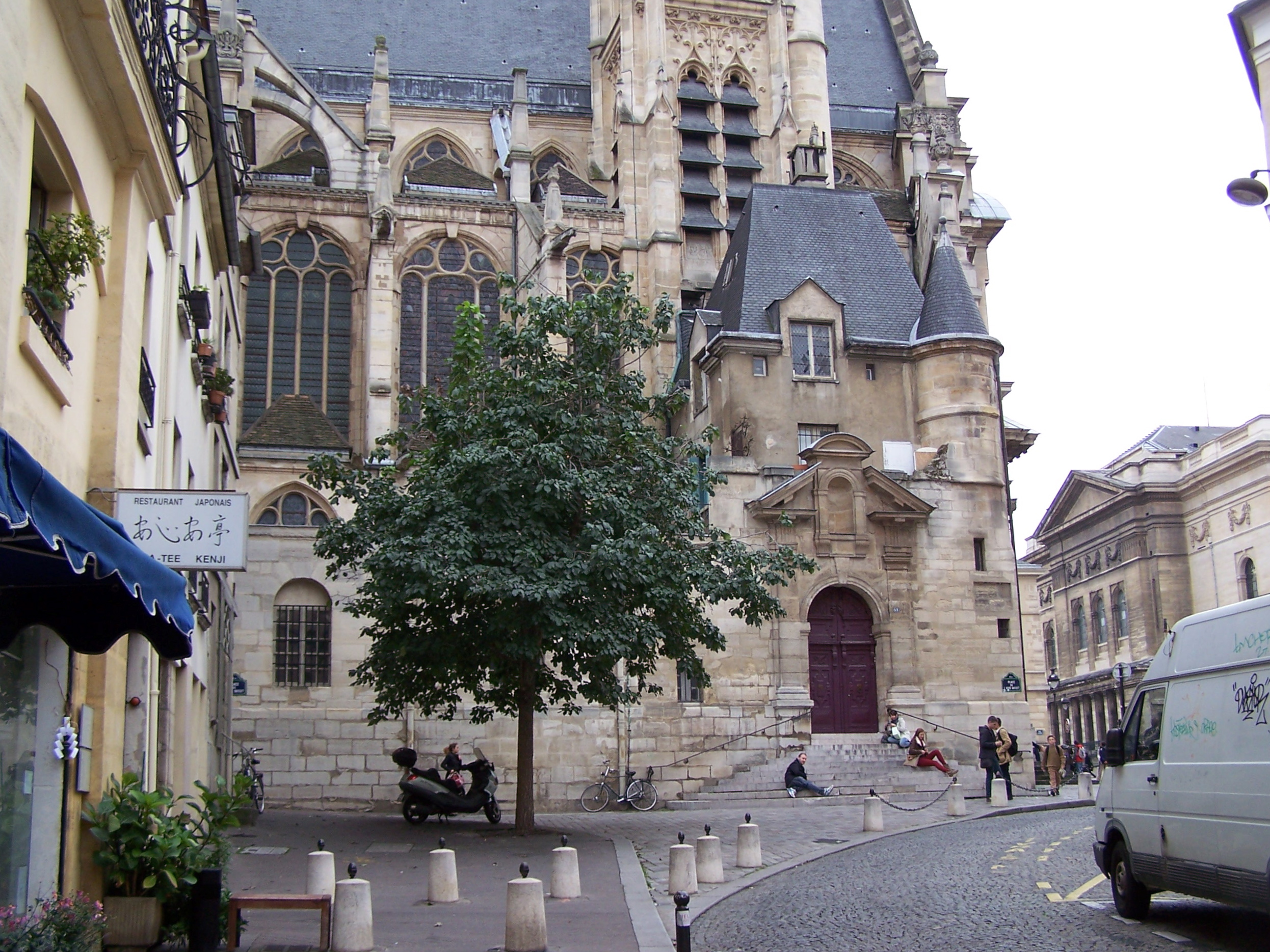 Place de l'Abbé-Basset et rue de la Montagne-Sainte-Geneviève dans le 5e arrondissement de Paris